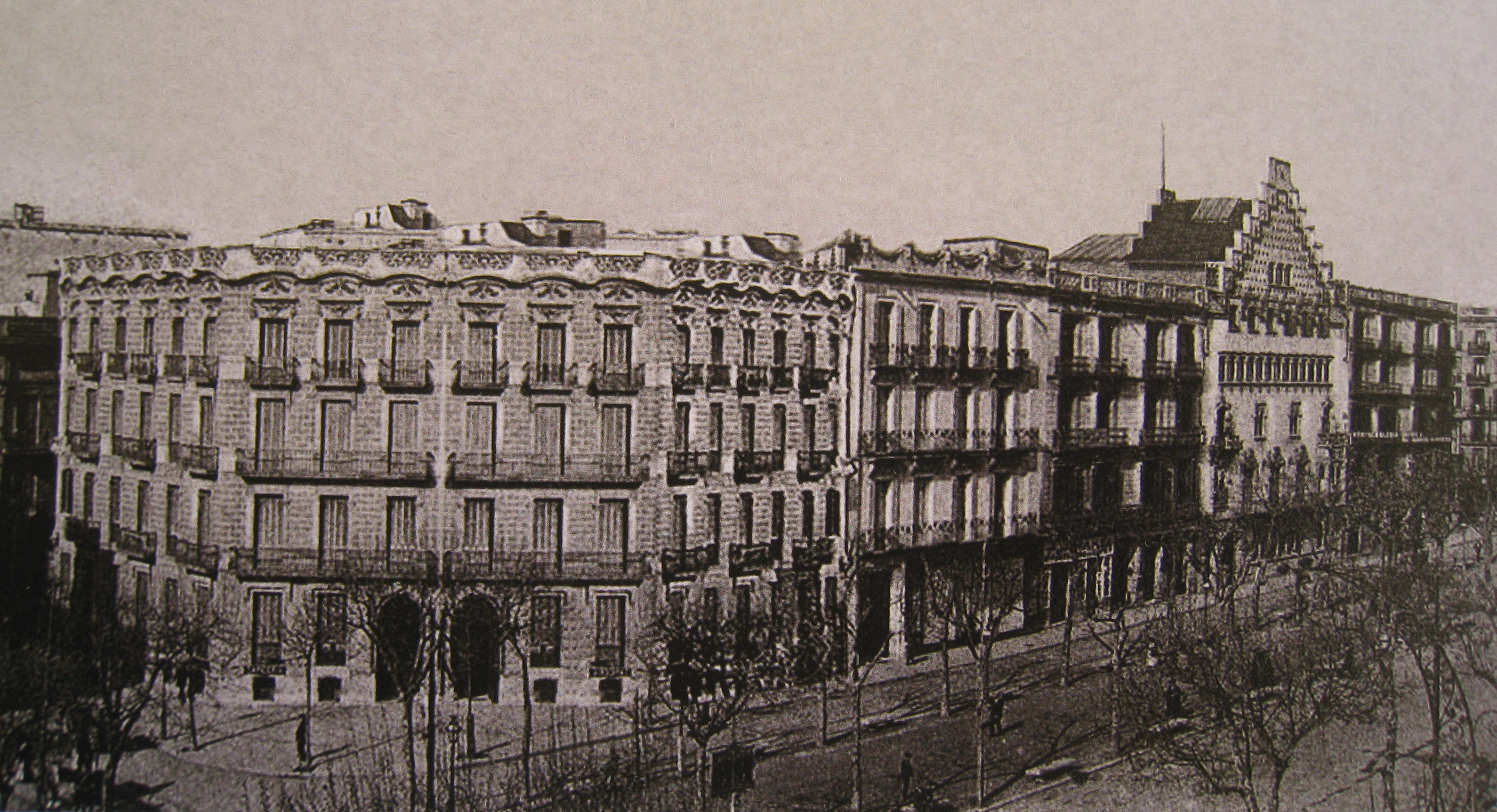 Mansana de la discòrdia (Psg. de Gràcia entre Consell de Cent i Aragó). En segon pla, la casa Amatller. La casa Batlló (1905-1907) i la casa Lleó Morera (1904) encara no estava construïdes.